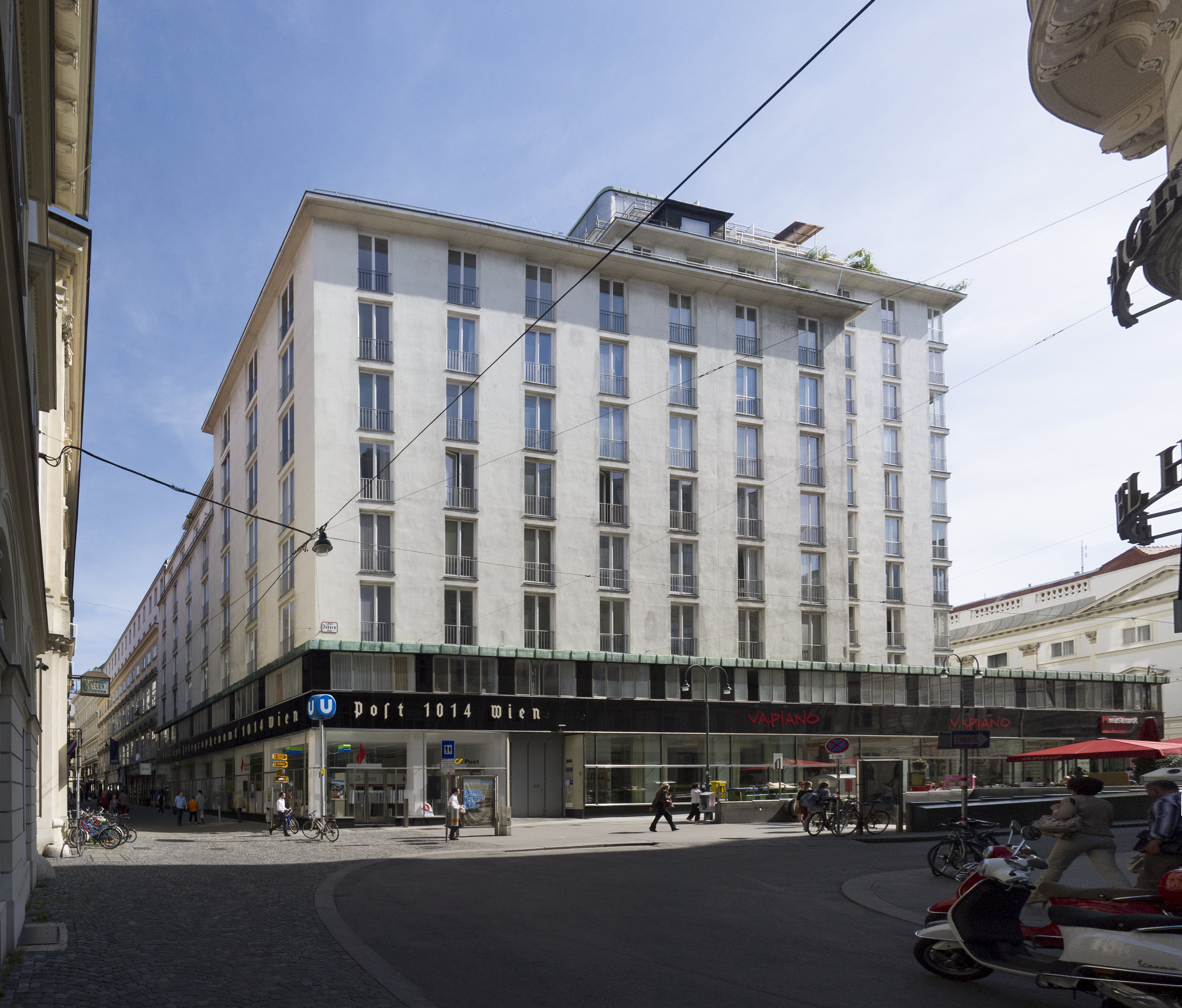 Zweites Wiener Hochhaus